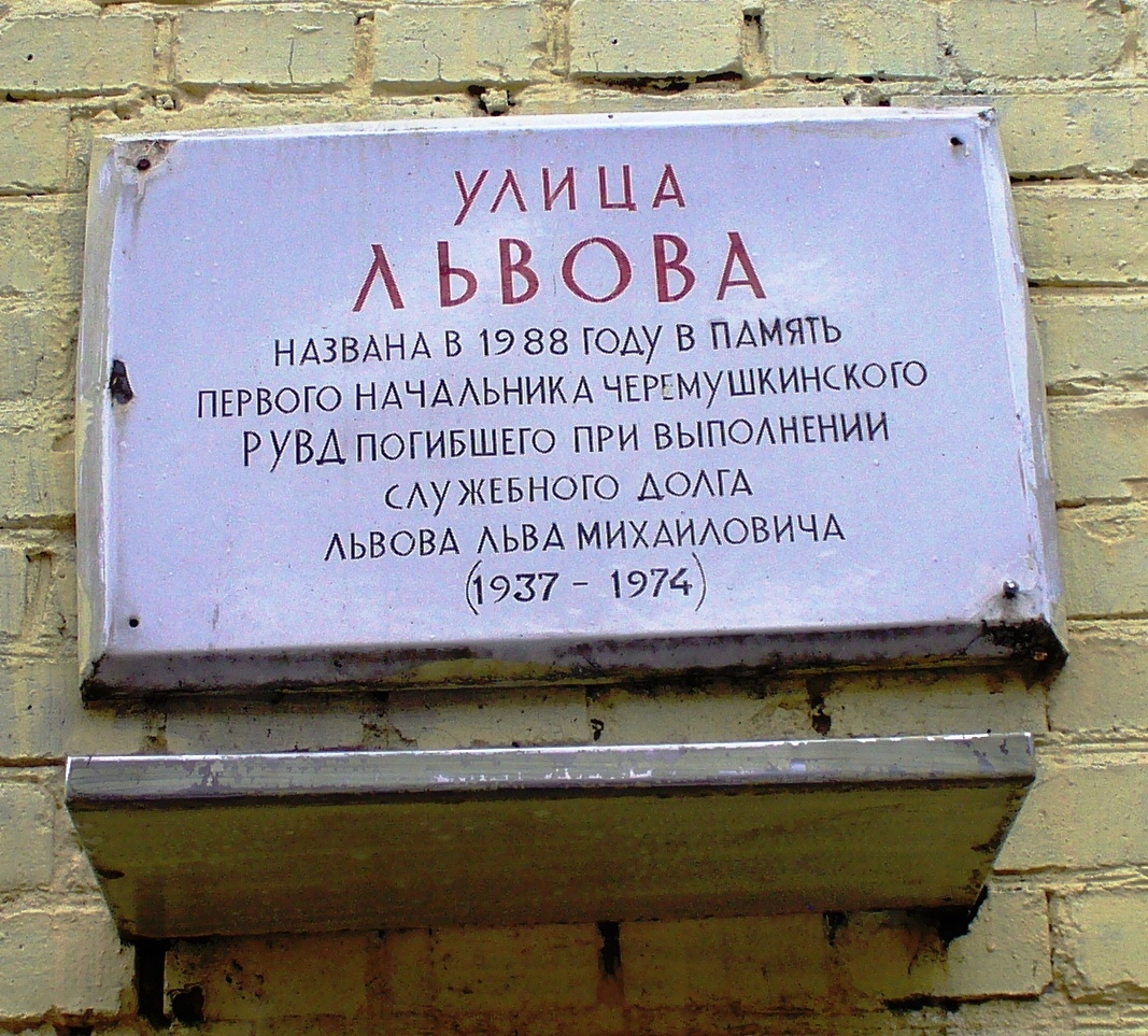 Табличка на улице Львова в Москве. 1